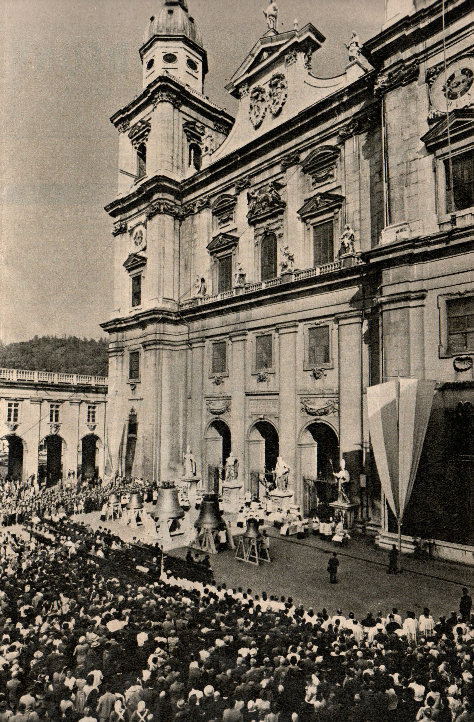 Weihe der Salzburger Domglocken 1961 von der Residenz aus gesehen